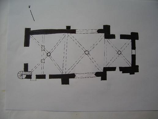 Grundriss Saint-Julien Ende des 13. JH